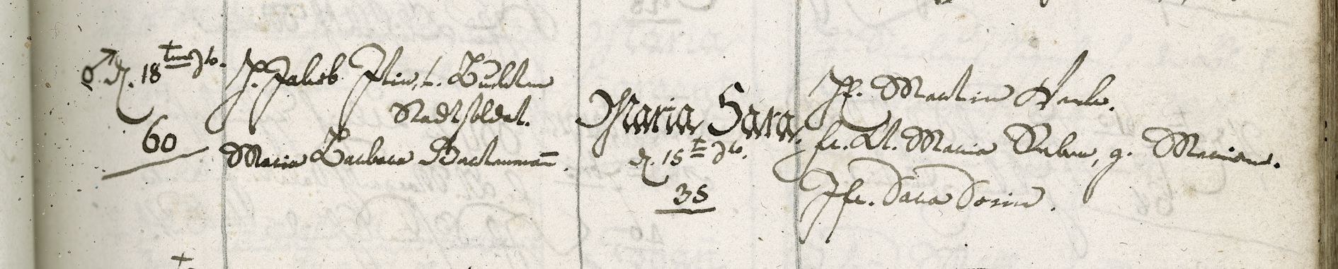 Theo der Pfeifenraucher: Taufeintrag Maria Sara Itin, 15. August 1835